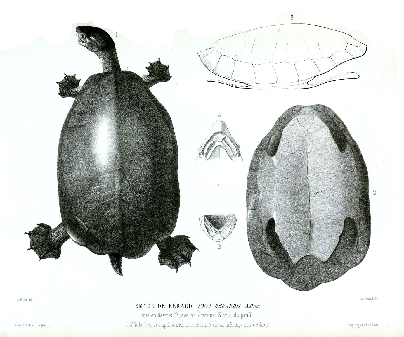 Emys berardii = Dermatemys mawii